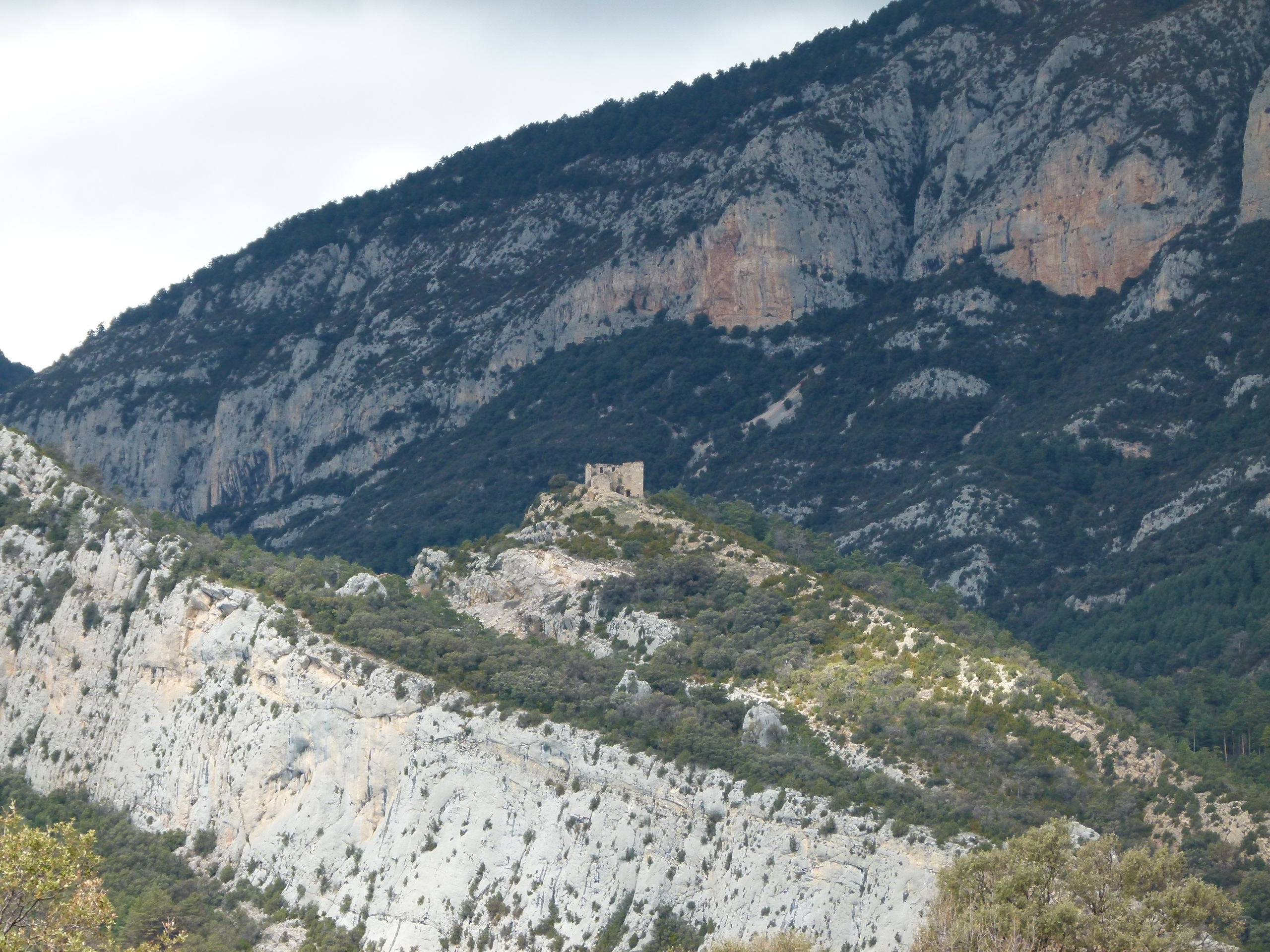 Castell d'Odèn